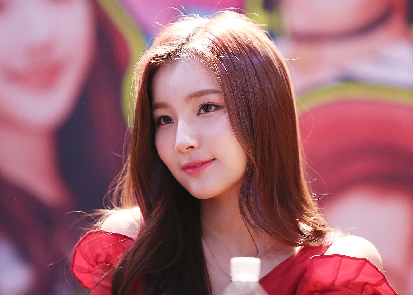 171014 엘리스 ELRIS 팬싸인회 @문래청소년수련관